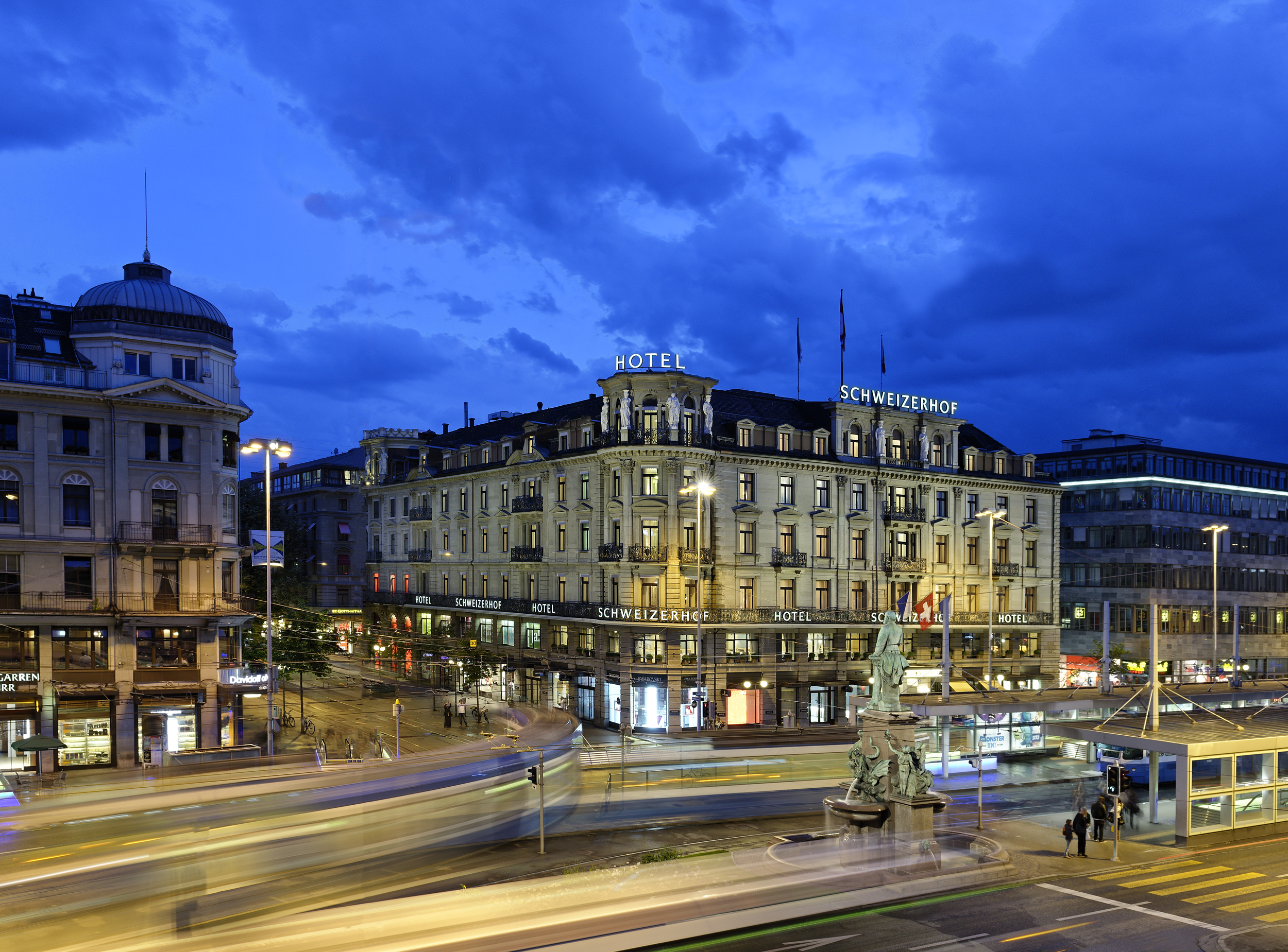 Aussenaufnahme Hotel Schweizerhof Zürich